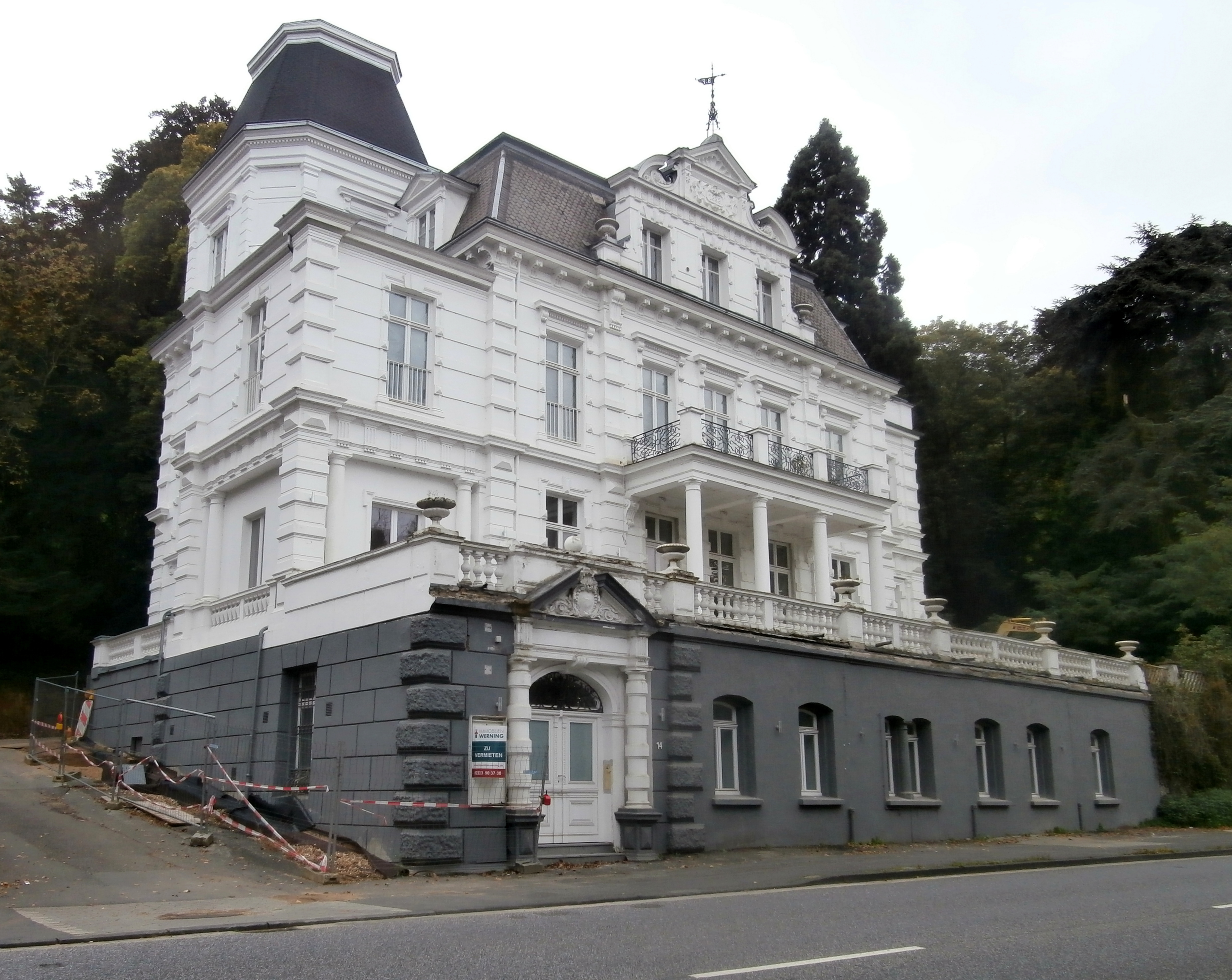 Villa Rolandseck (Mainzer Straße 14) an der Bundesstraße 9, Rolandswerth, Stadt Remagen